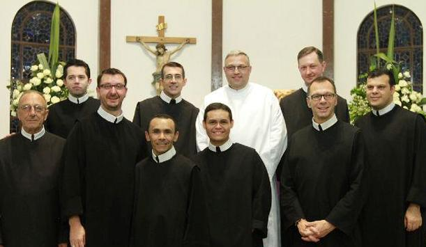 Irmãos do Brasil e da Alemnha, juntos na Capela S. Luis Gonzaga, Maringá, PR.